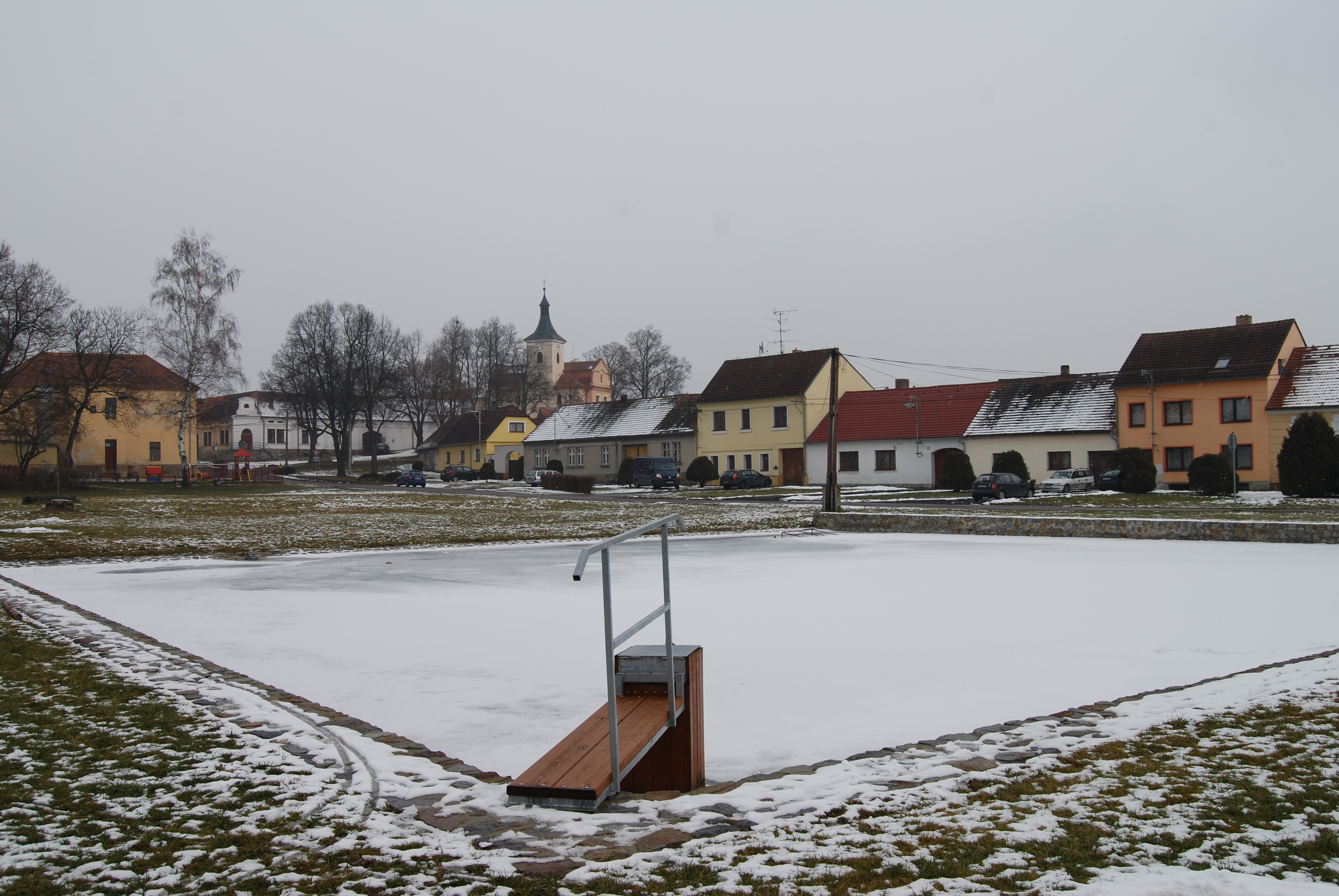 Pohled na náves a rybník (požární nádrž). Krč je místní část obce Protivín v okrese Písek. Česká republika.